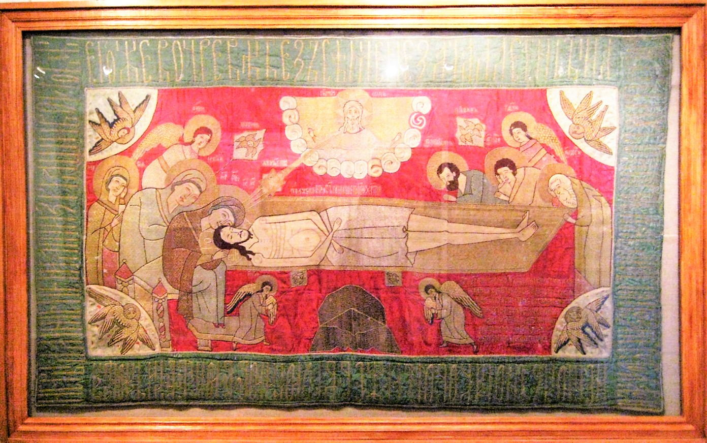 Epitaphios. Плащаница. Before 1673. Nizhniy Novgorod school (?). Нижегородский государственный художественный музей